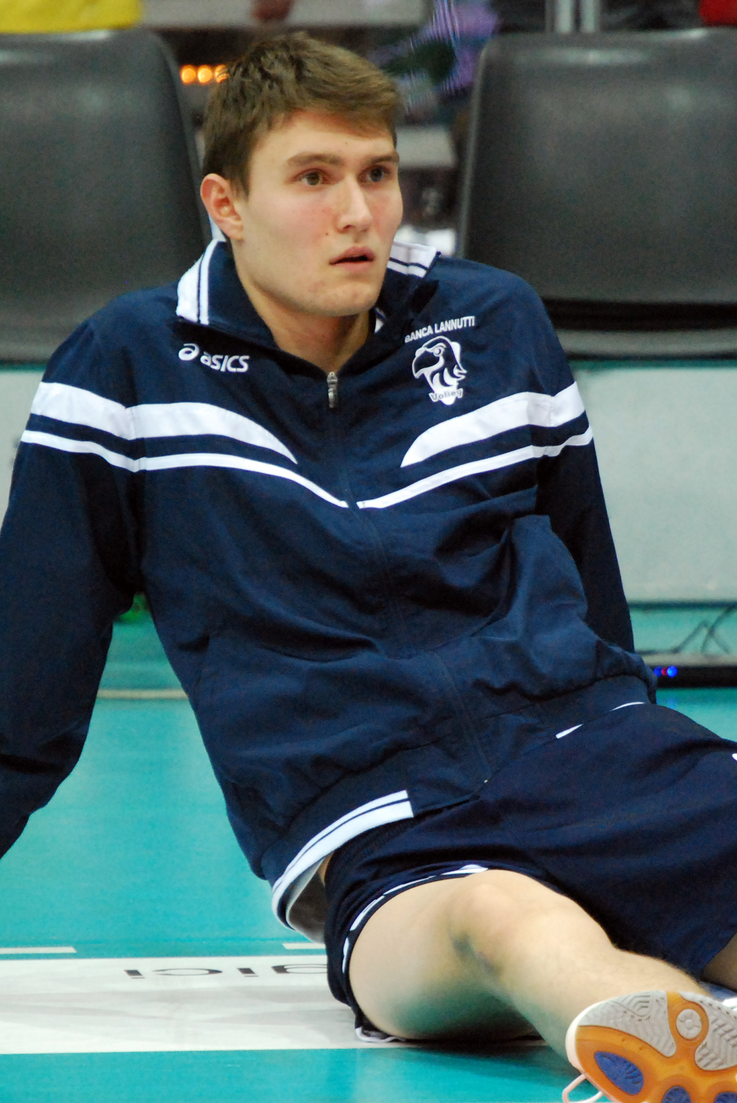 Oleg Antonov